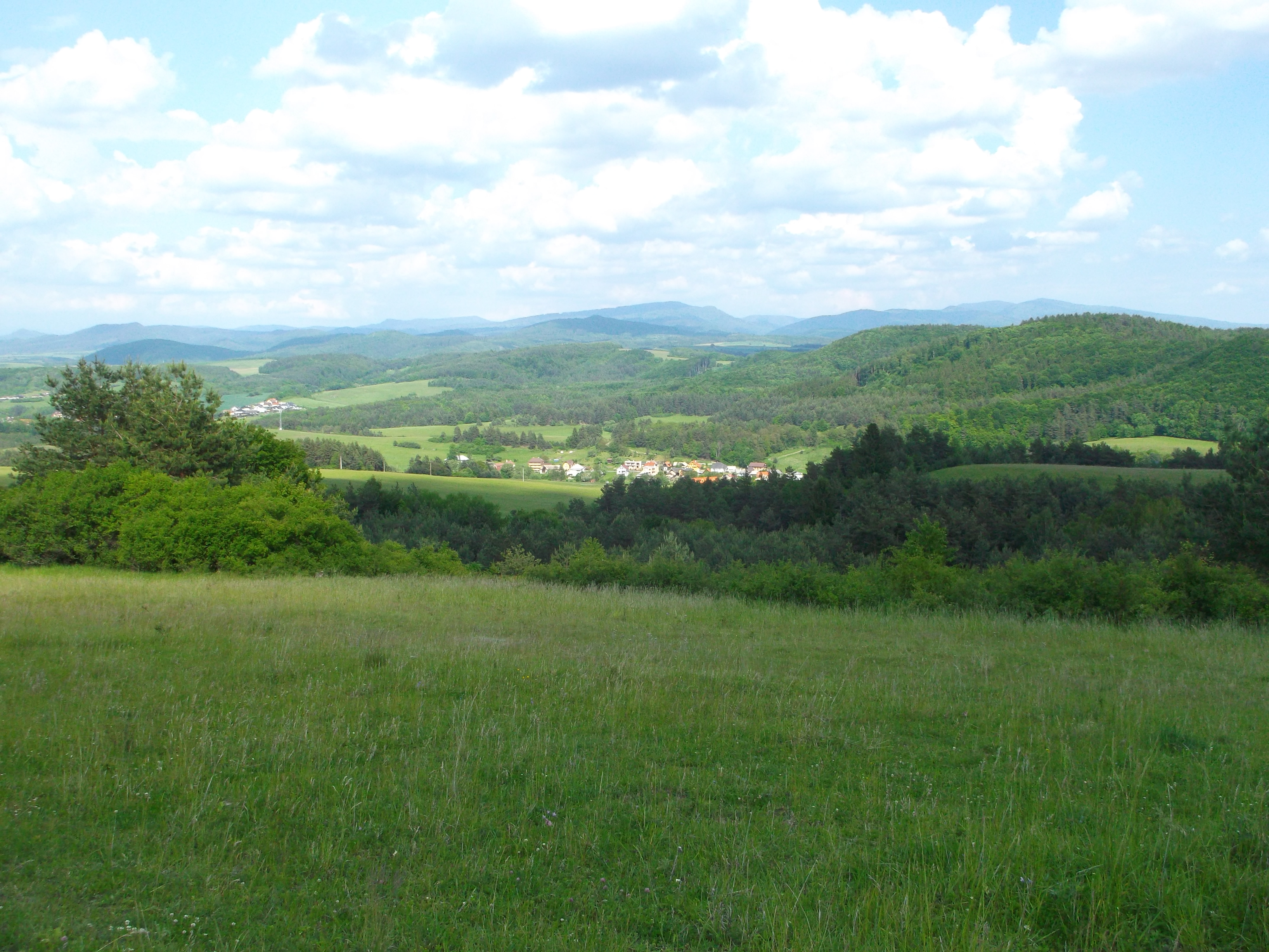 Dedinka v údolí